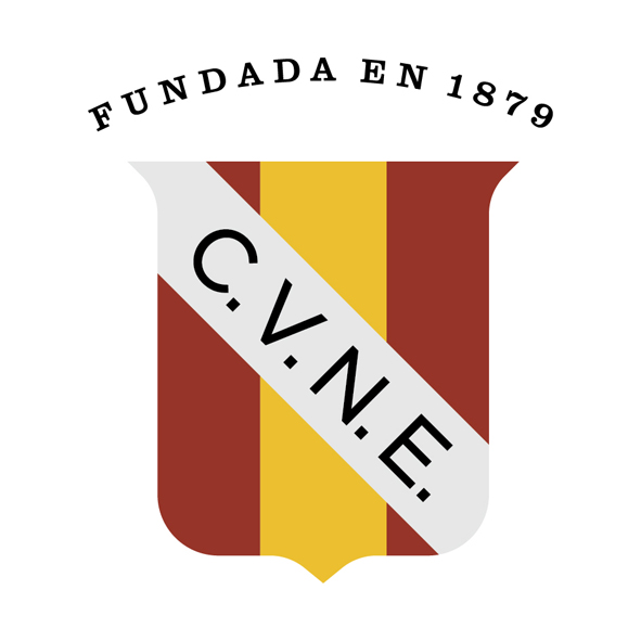 Logo actual de la bodega CVNE